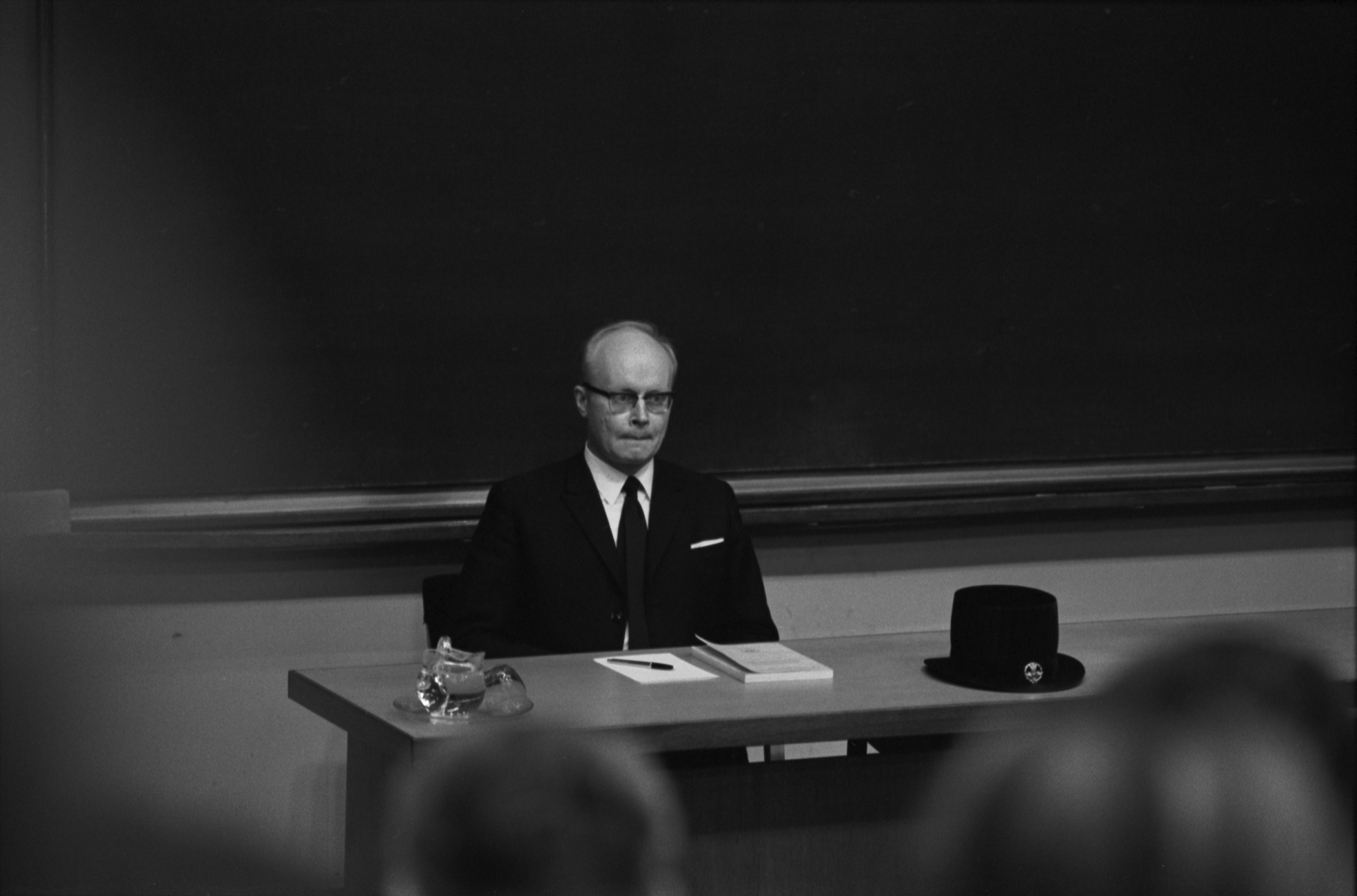 Valtiotieteen maisteri Yrjö-Paavo Häyrysen väitöstilaisuus Helsingin yliopiston Porthania-rakennuksessa, Hallituskatu 11–13 (nyk. Yliopistonkatu 3). Kuvassa tilaisuuden kustoksena toiminut sosiaalipolitiikan professori Olavi Riihinen (1930–).